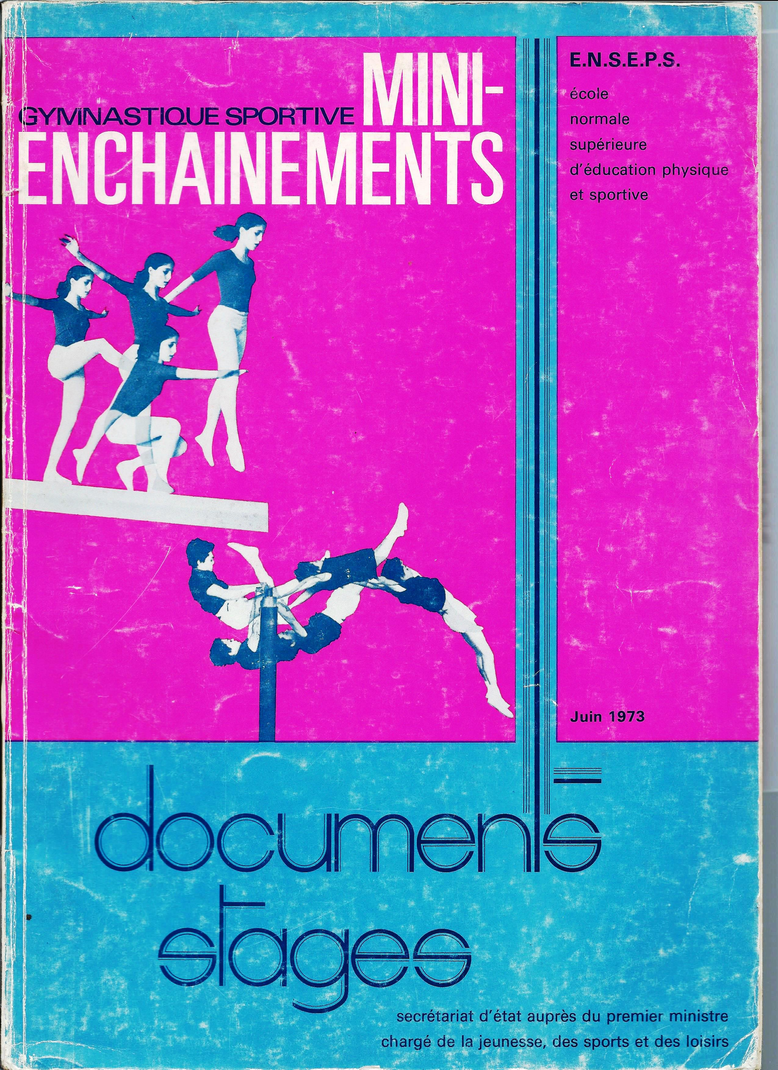 Couverture de revue française